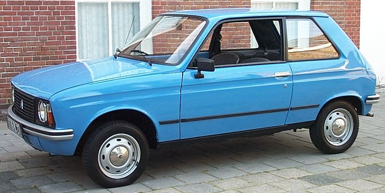 Citroen LN 1977